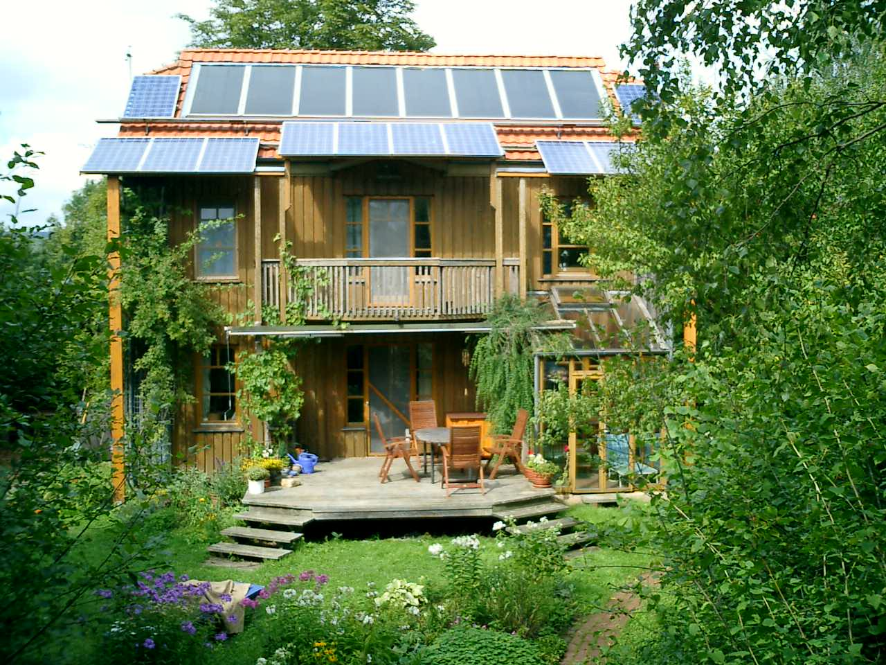 Ehemaliges Nullenergiehaus in Dörpe (heute Niedrig-Energie)